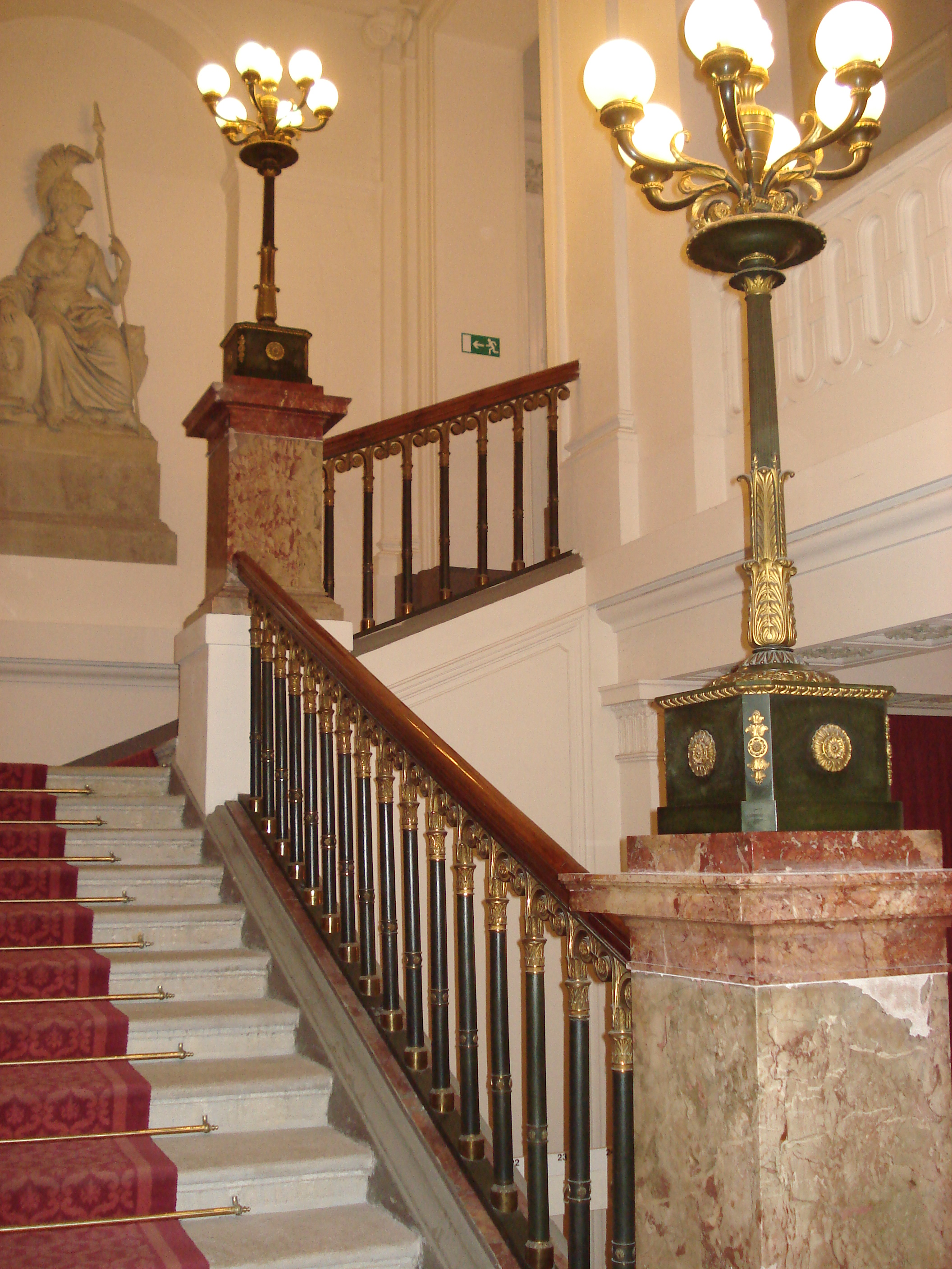 Palais_Starhemberg1